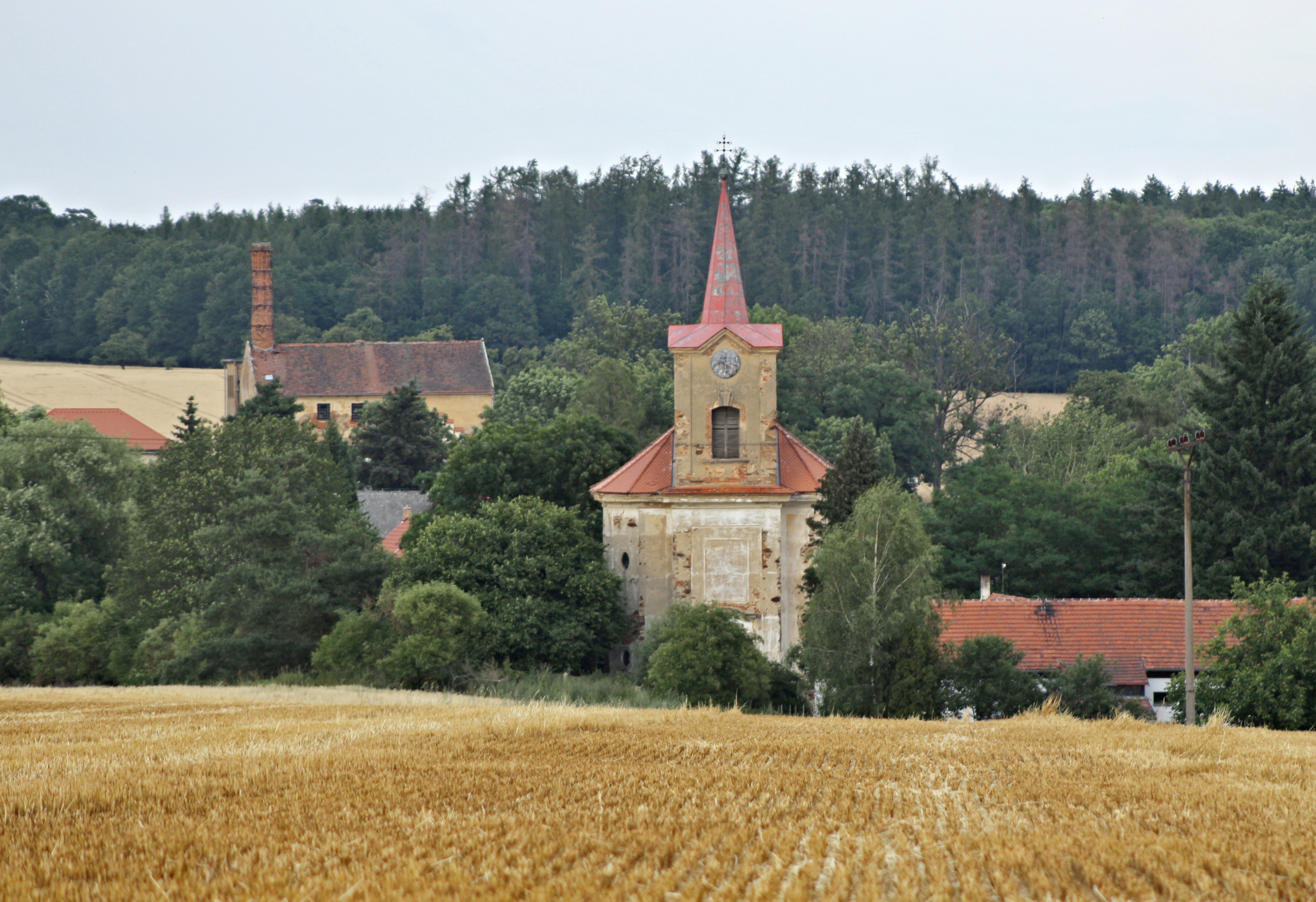 Nový Dům u Rakovníka, kostel svaté Máří Magdalény